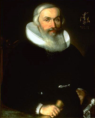 Herrenporträt Johann Heinrich Waser, 1652-69 Bürgermeister von Zürich. Öl auf Leinwand; 75 cm x 61 cm Schweizerisches Landesmuseum, Zürich